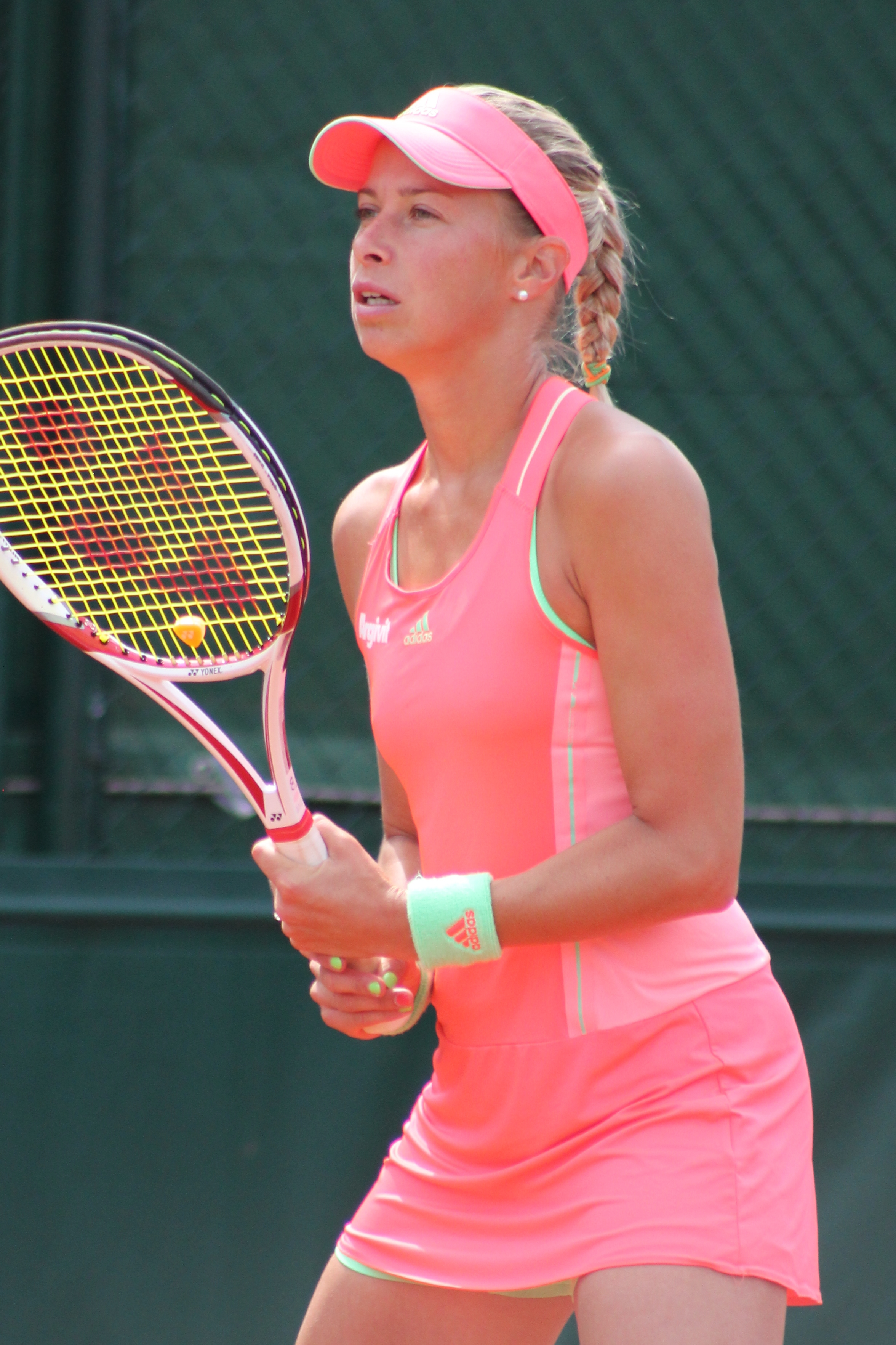 Hlavackova RG15 (14)